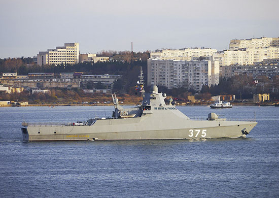 Патрульный корабль проекта 22160